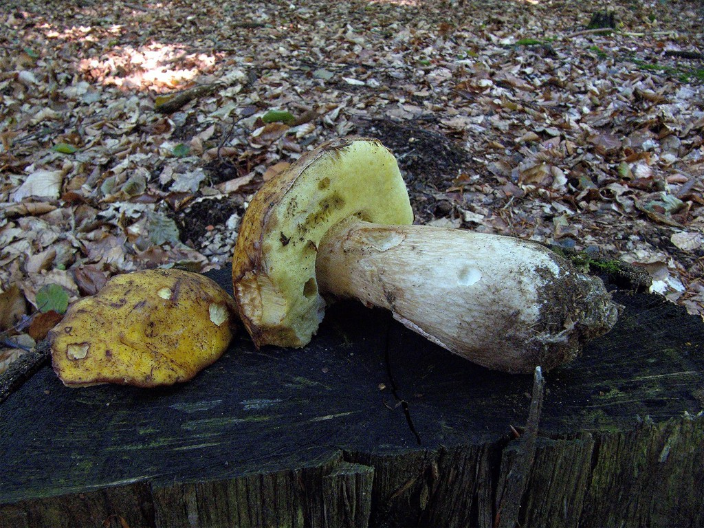 Zitronenhütiger Steinpilz (Boletus edulis var. citrinus)